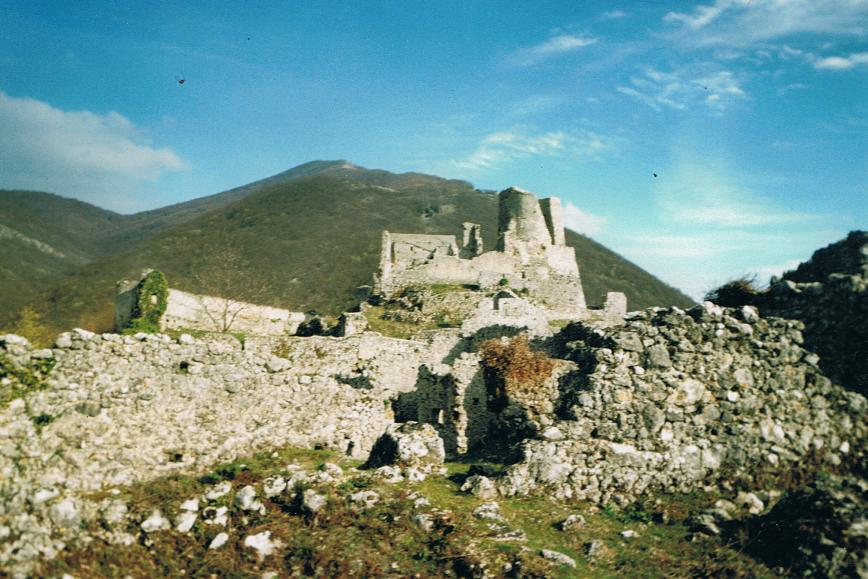 particolare del castello di Gioia Sannitica (Bn)